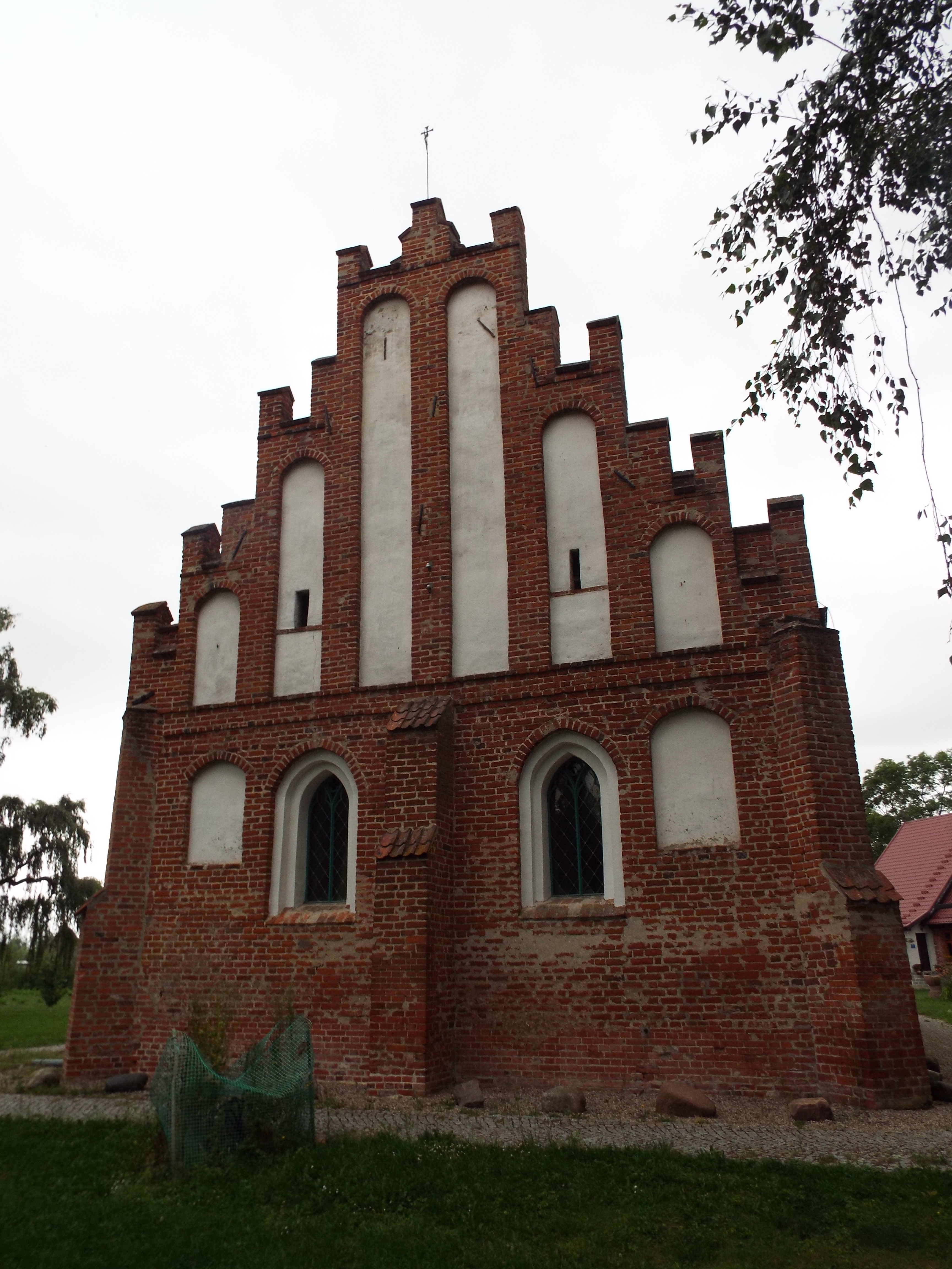 Cyganek - pierwotnie kościół rzymskokatolicki, obecnie greckokatolicka cerkiew parafialna, 1352, 1637-1674